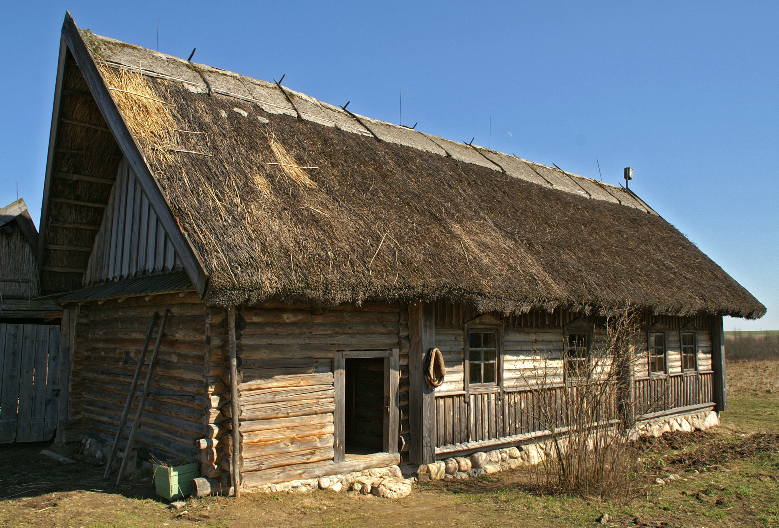 Беларуская (тарашкевіца): Сядзіба зь в. Бракава Слабада Чавускага раёну Магілёўскай вобласьці. в. Азярцо This is a photo of Belarusian heritage monument. Reference number: 612Г000402 ( WLM)